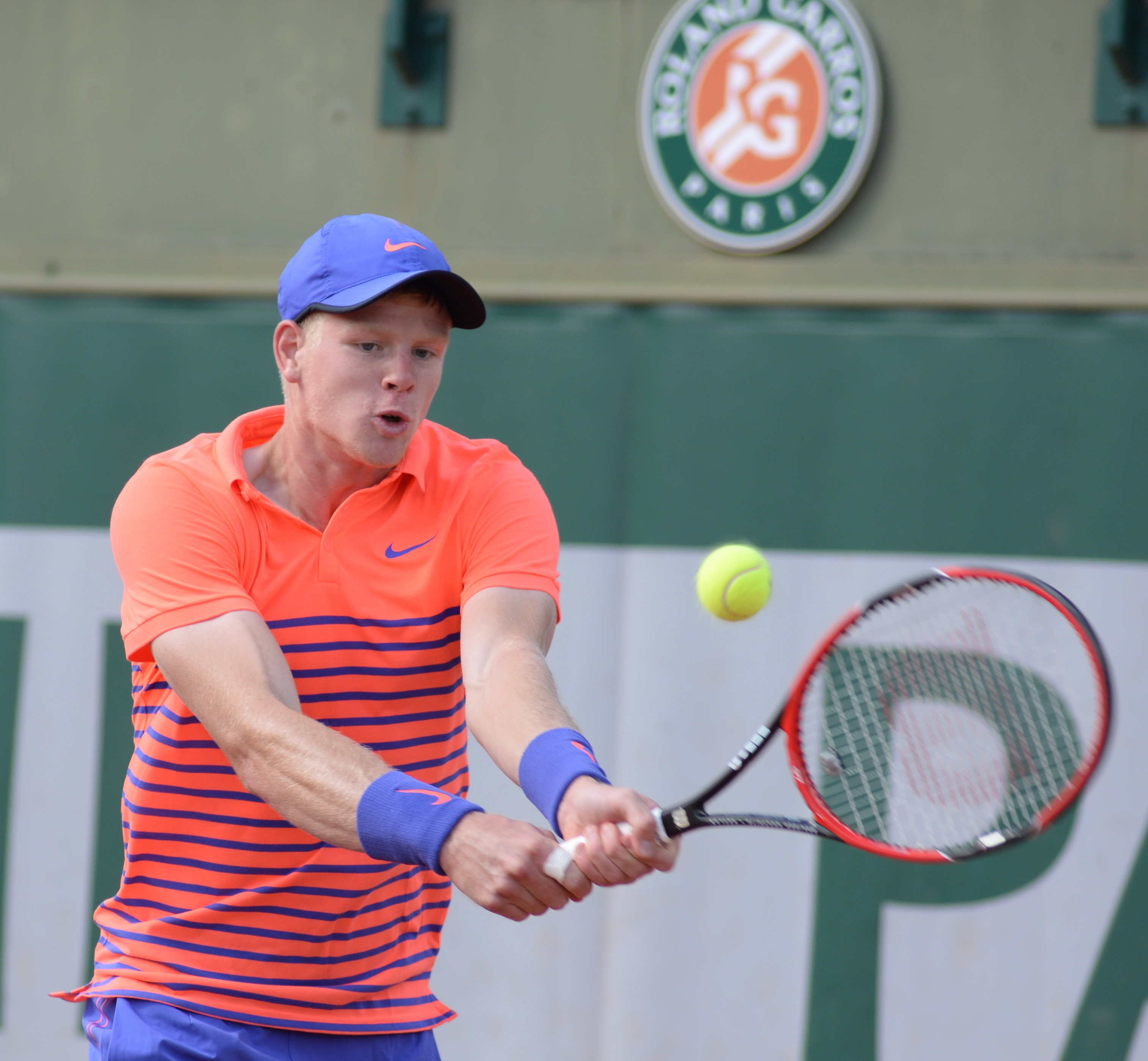 Kyle Edmund